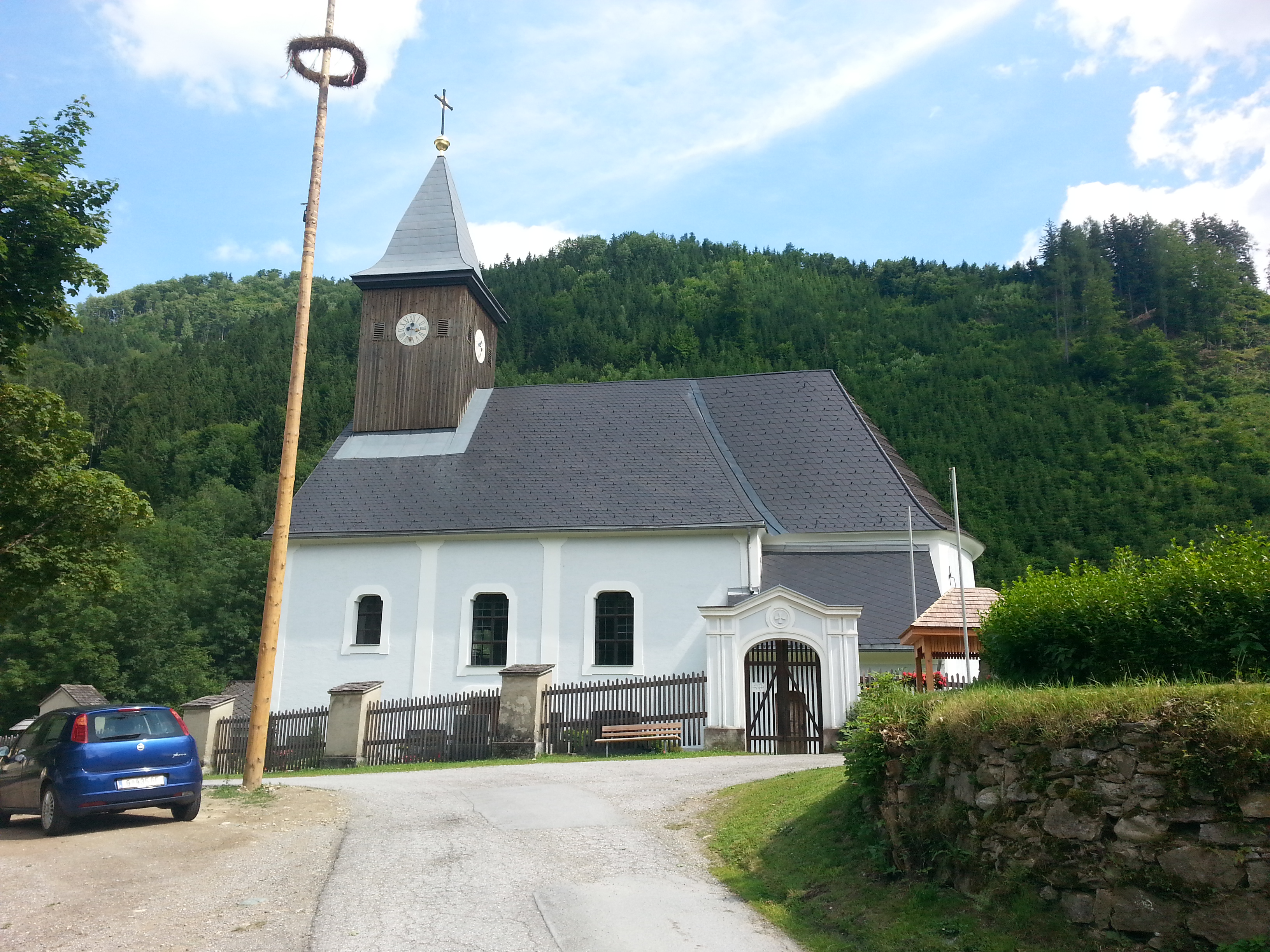 Kath. Pfarrkirche hl. Anna und Friedhof mit Torbau, Initienkapellen und Umfriedung in Großstübing, Steiermark